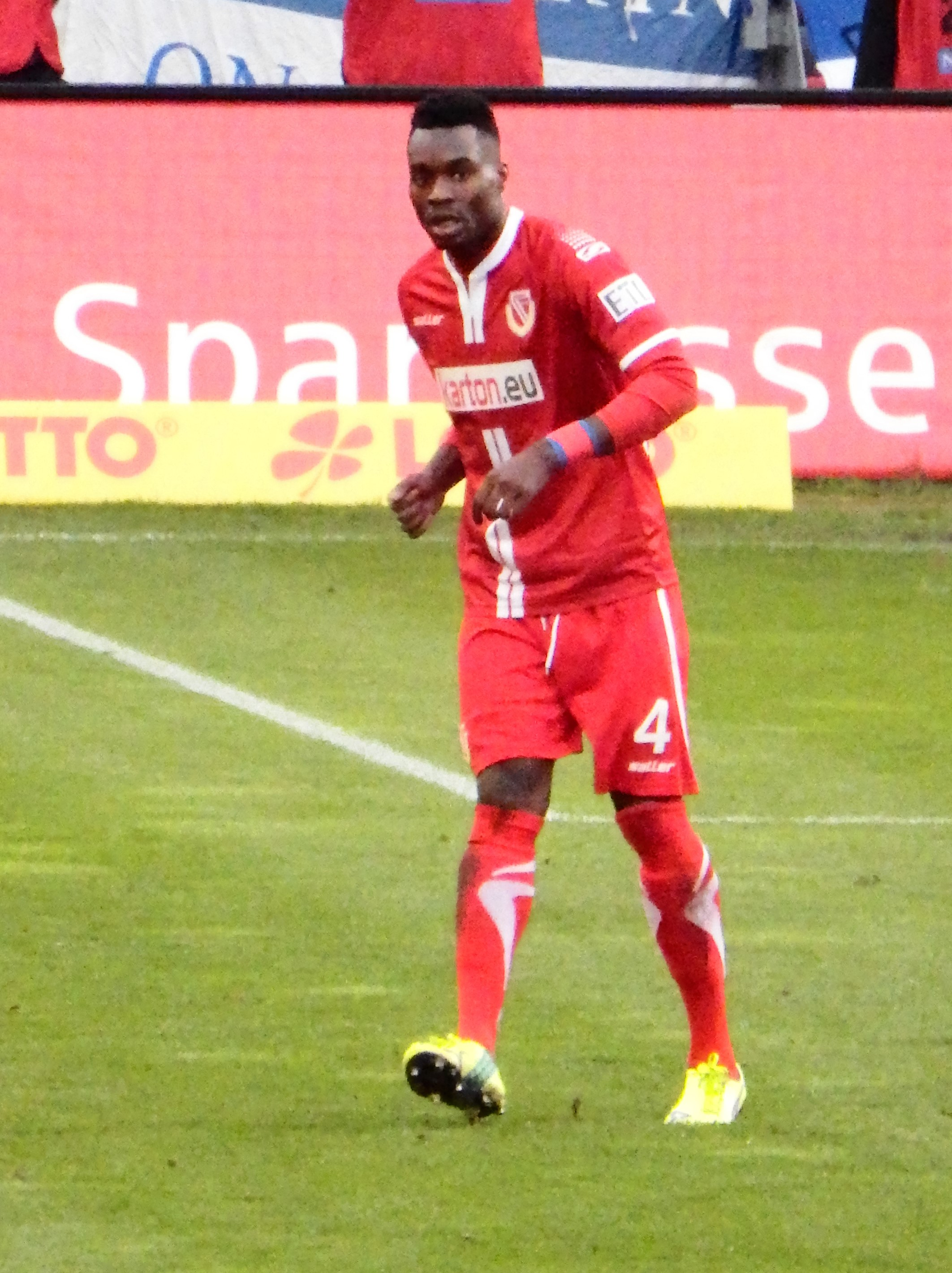 Mimbala, Cedric Cottbus 14-15